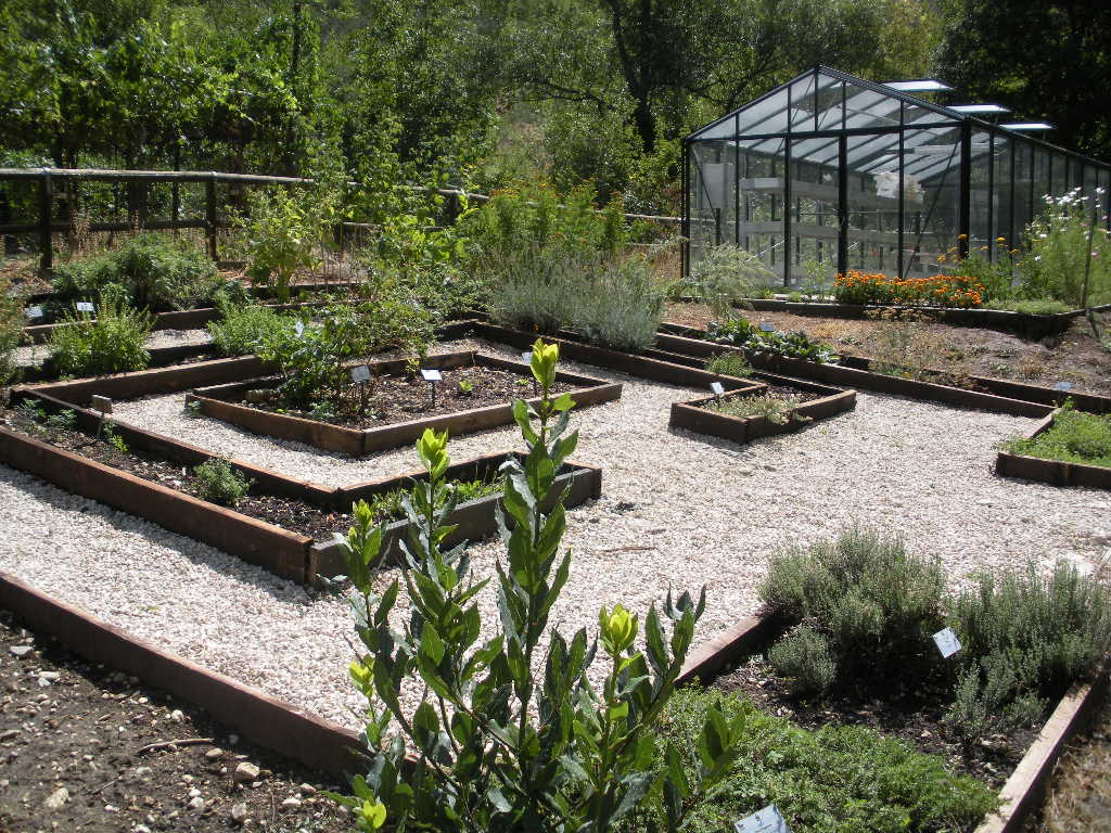 Giardino Botanico delle Sorgenti del Cavuto - Anversa degli Abruzzi (AQ) Foto personale